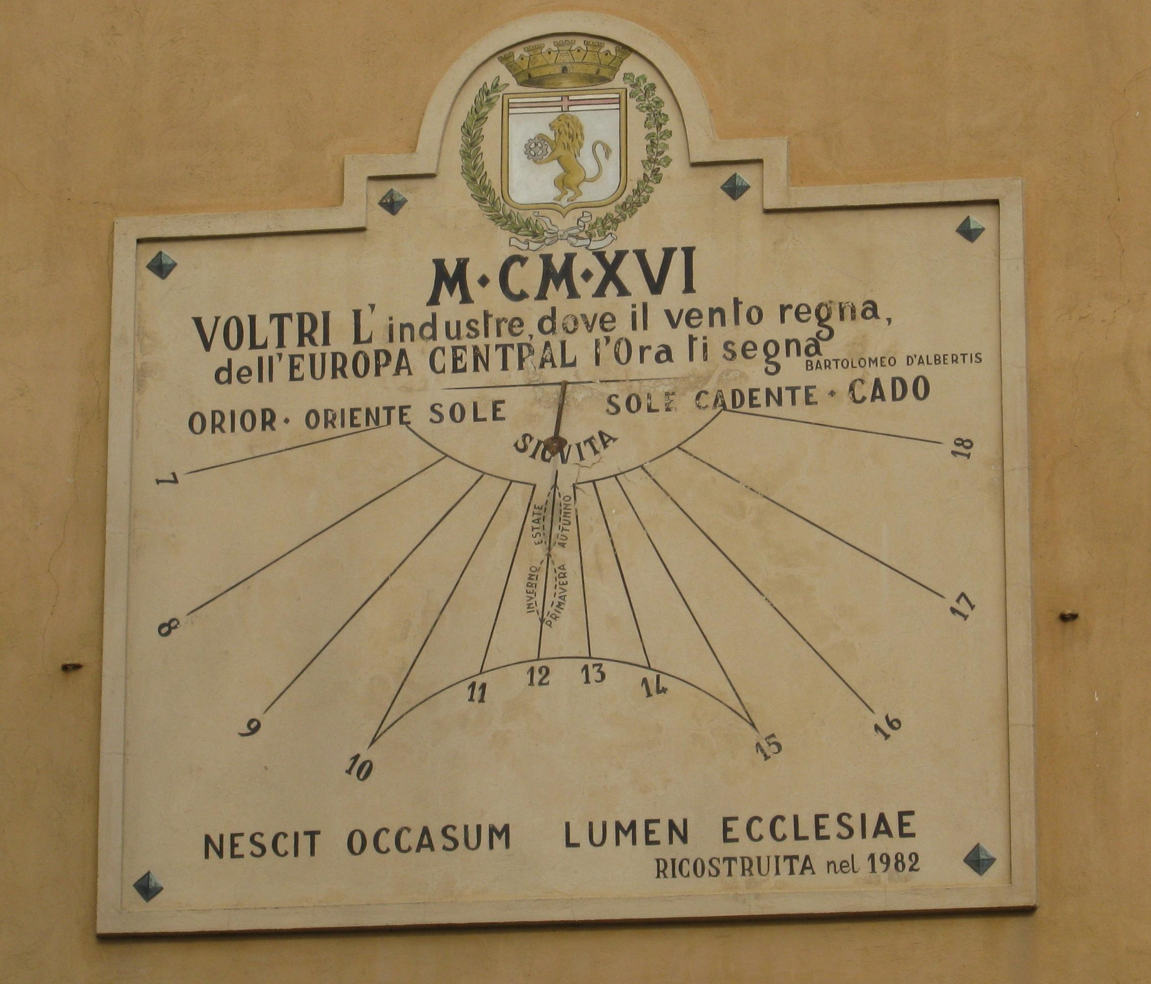 Meridiana sul lato sud della chiesa di san Erasmo a Voltri.